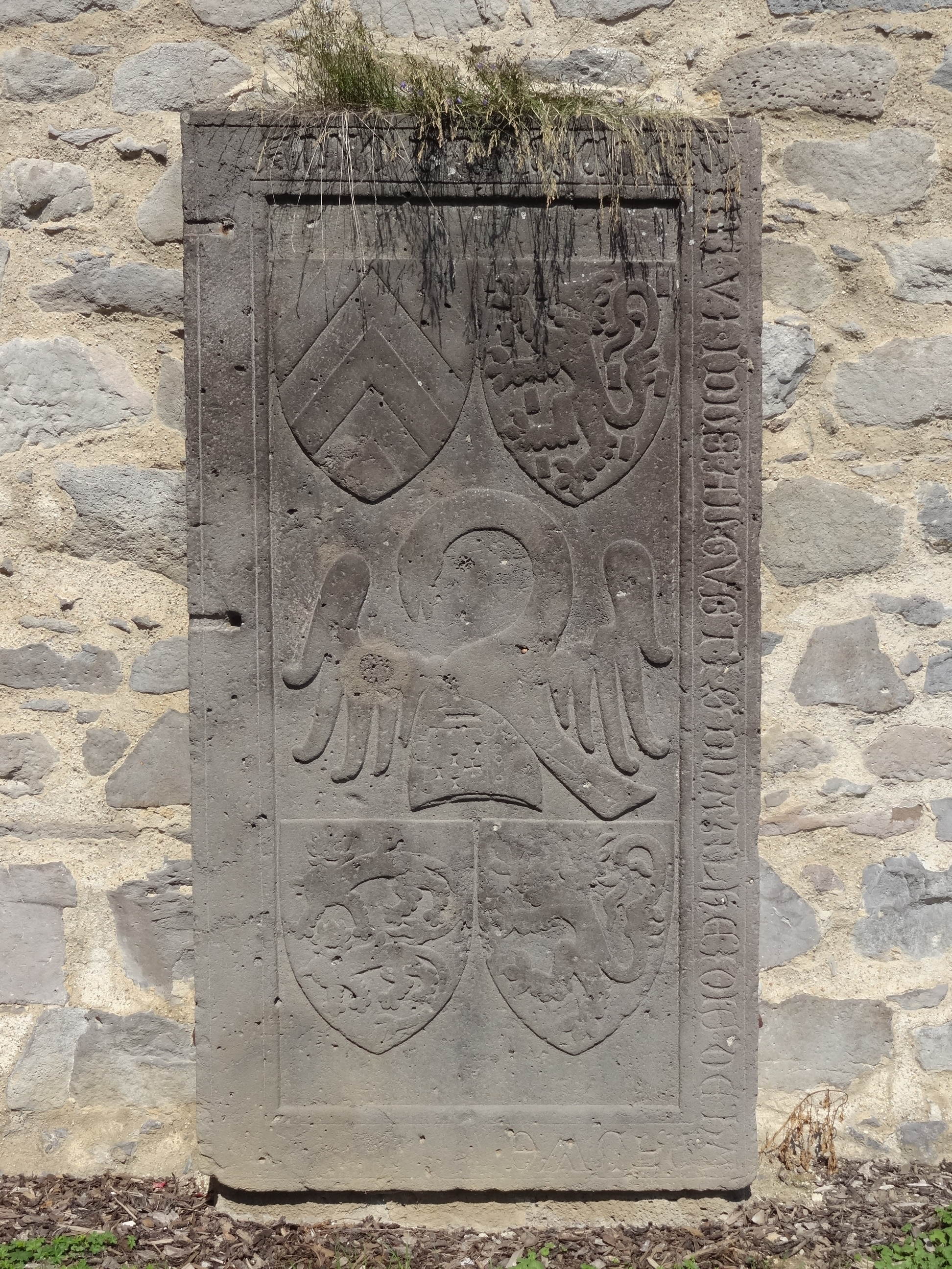 Kloster Arnsburg (Kreuzgang und Kriegsopferfriedhof)